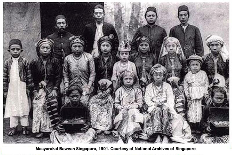 A group of Baweanese people 1901, one of the larger ethnic Malay groups in singapore